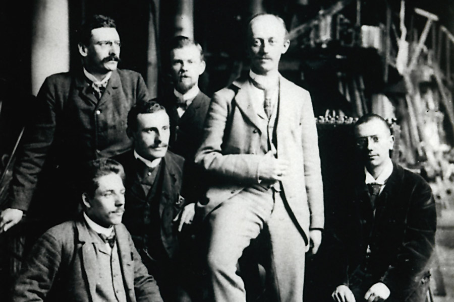 Michail Ossipowitsch Doliwo-Dobrowolski mit Kollegen der AEG in Berlin